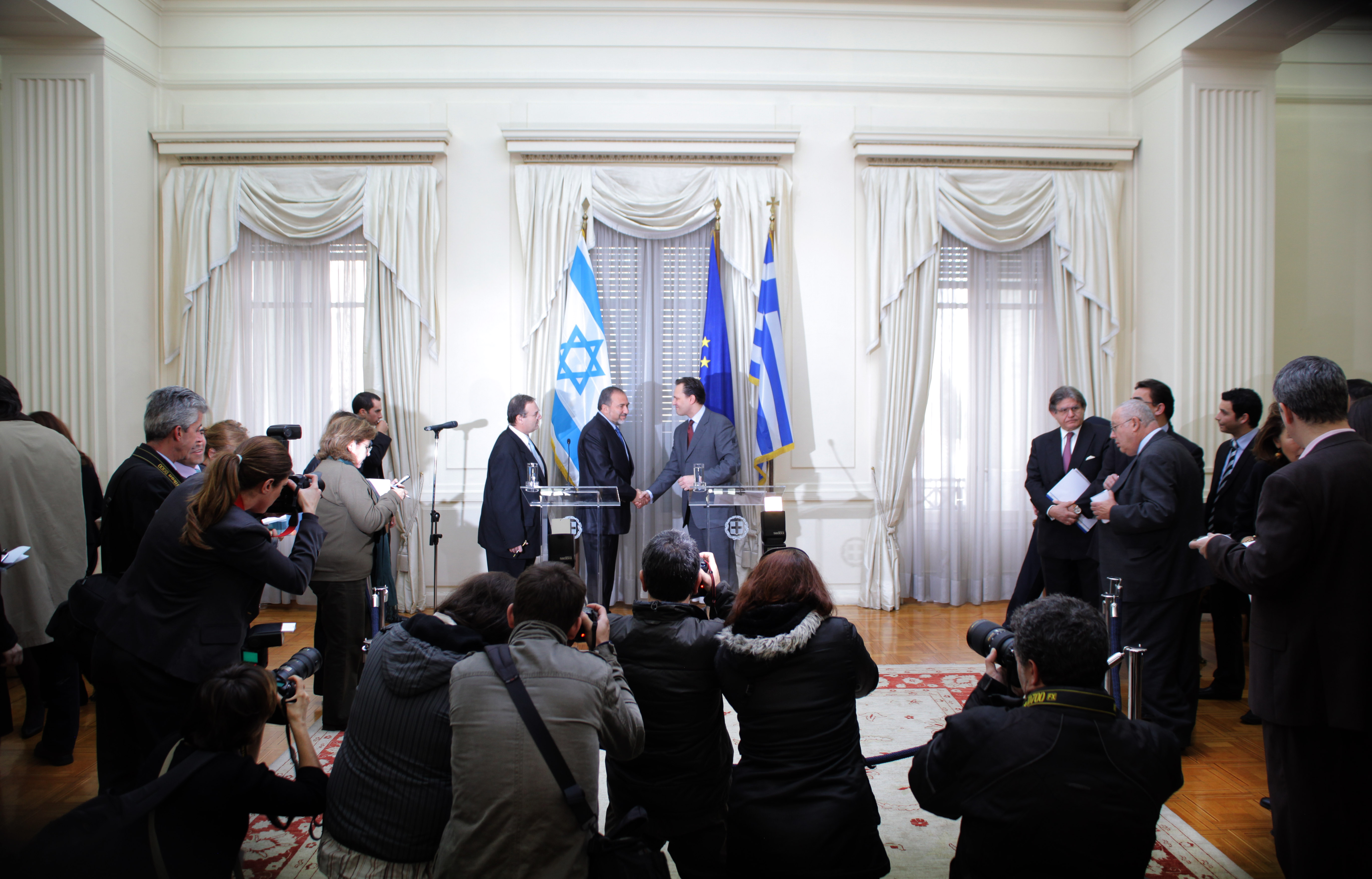 Την Τετάρτη 12 Ιανουαρίου 2010 και ώρα 13:30, ο Υπουργός Εξωτερικών κ. Δημήτρης Δρούτσας συναντήθηκε στο Υπουργείο Εξωτερικών με τον κ. Avigdor Liberman, Υπουργό Εξωτερικών του Ισραήλ, ο οποίος πραγματοποίησε επίσκεψη στη χώρα μας. Foreign Minister Dimitris Droutsas met at the Foreign Ministry at 13:30 on Wednesday, 12 January 2011, with Israeli Foreign Minister Avigdor Liberman, who carried out a visit to our country.